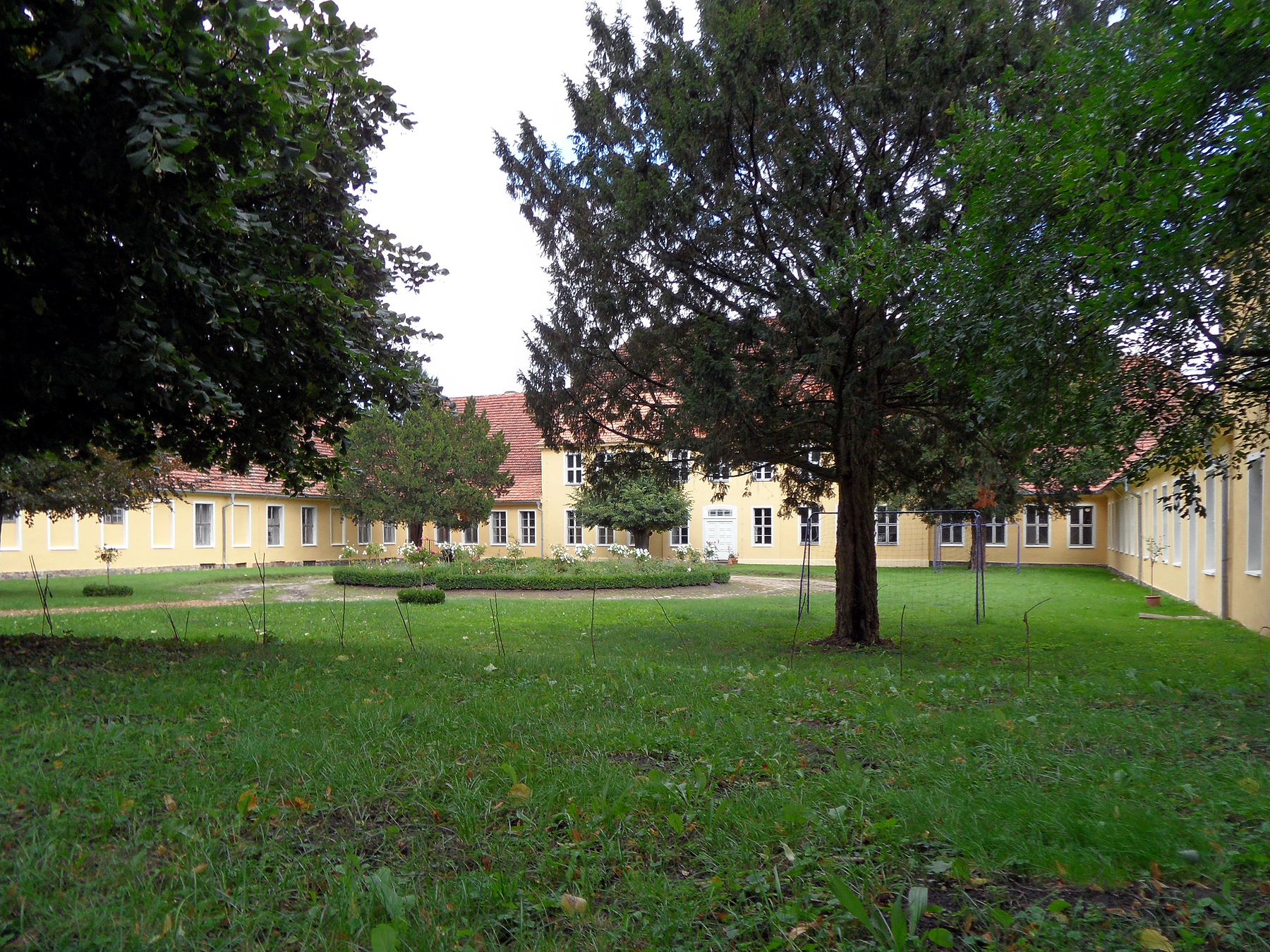 Gut Blumberg, Gutshaus, Dreiflügelanlage von 1792, Front